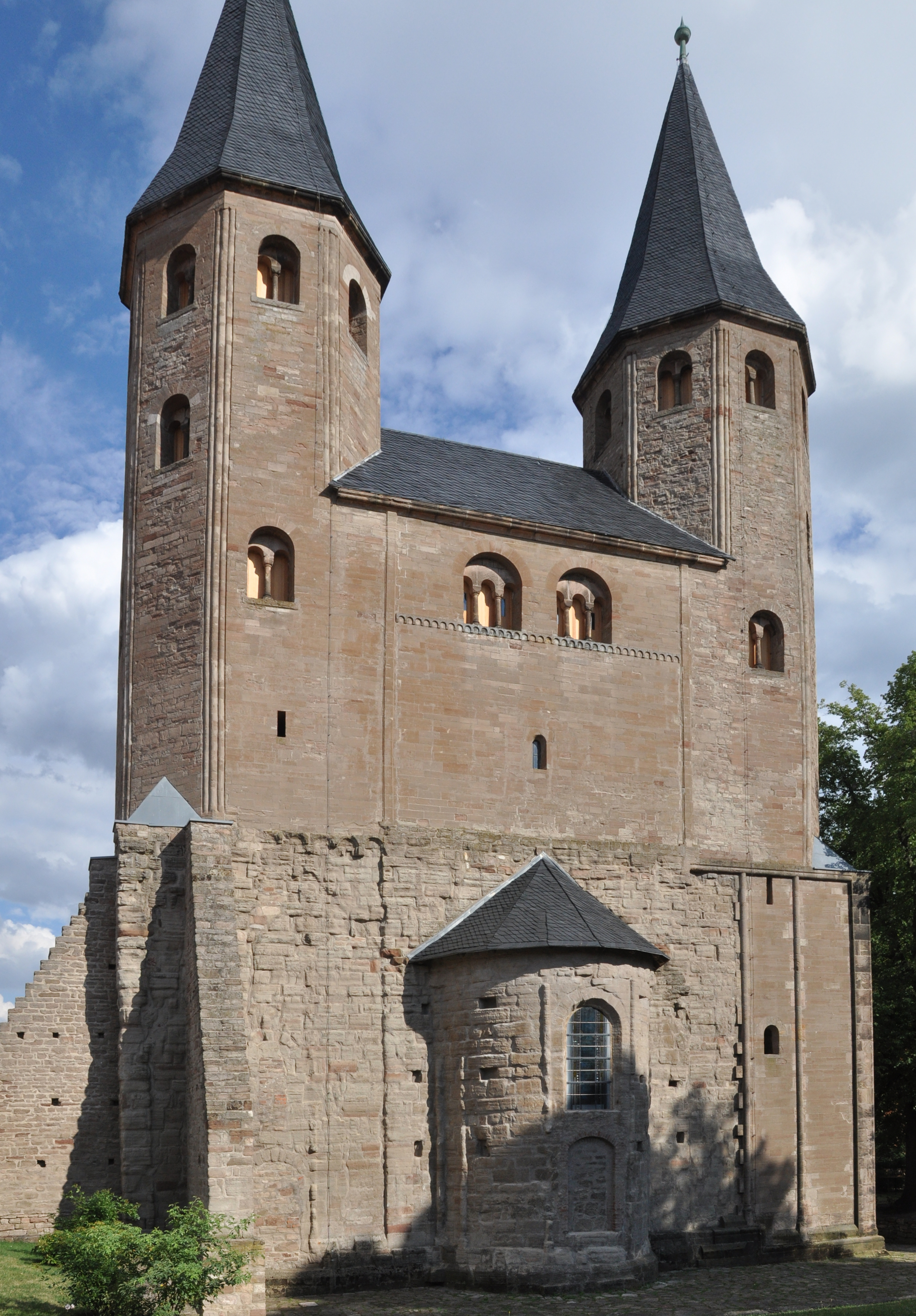 Kloster Drübeck, Westwerk der Kirche von Westen